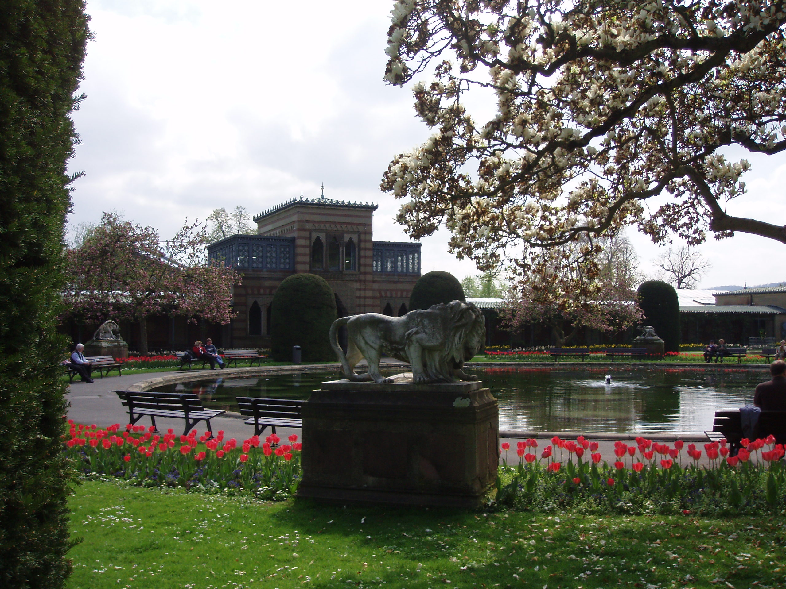 Seerosenteich der Wilhelma im Frühjahr